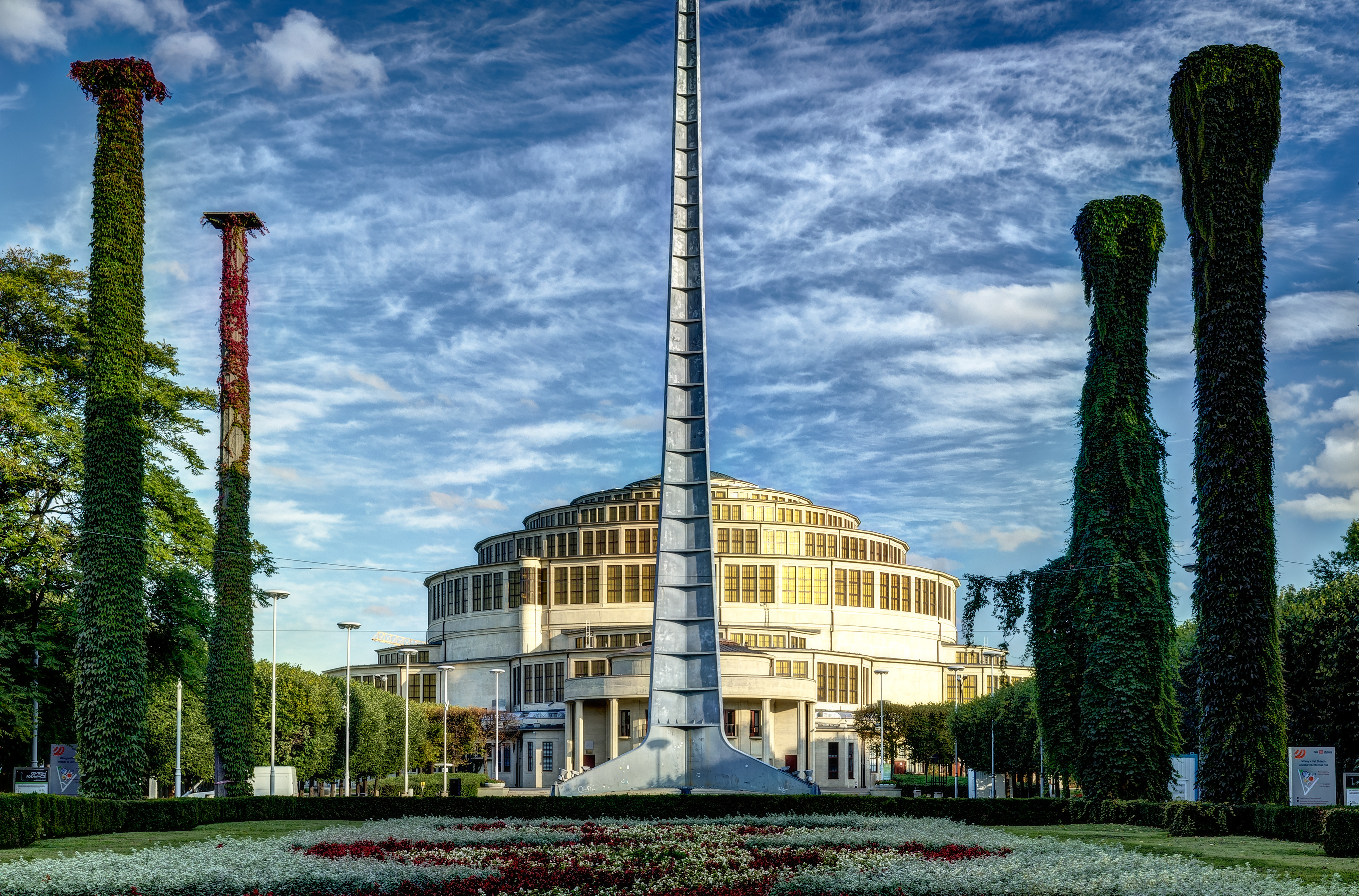 Wrocław, zespół Hali Ludowej